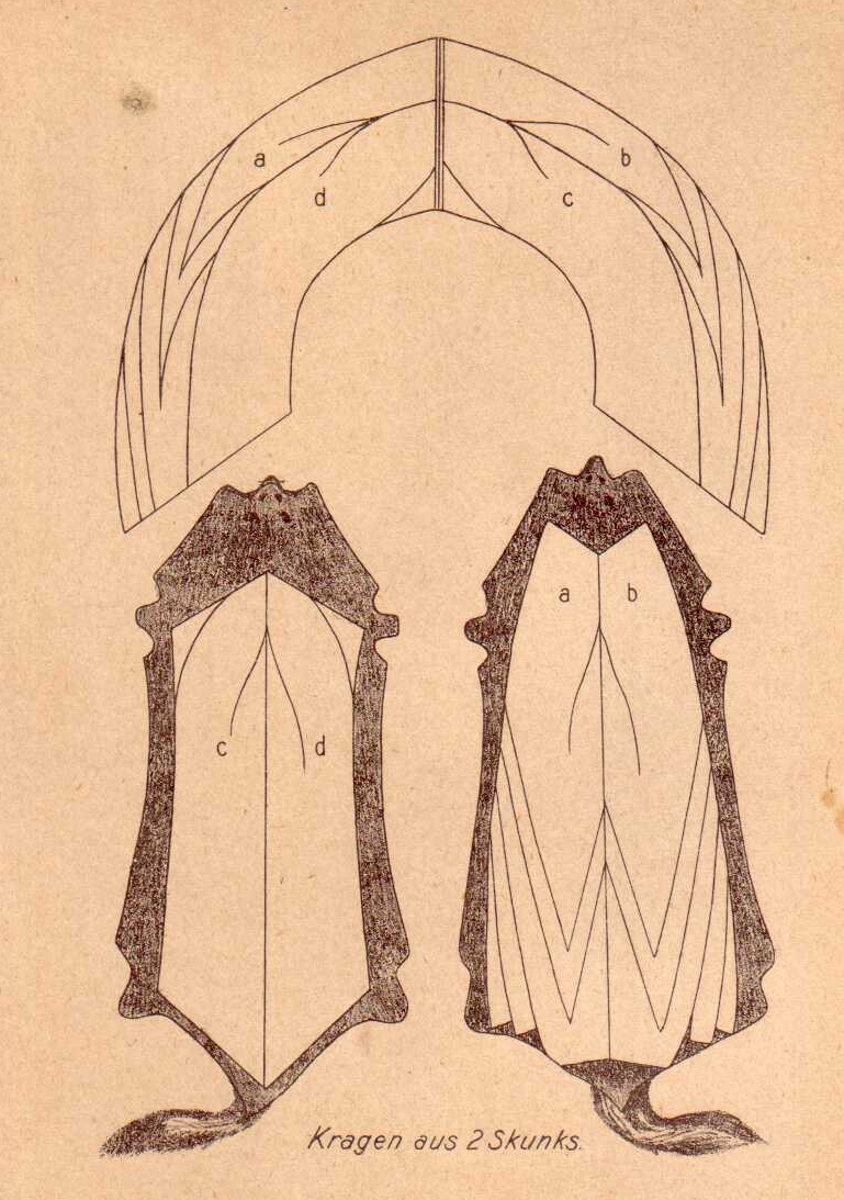 Graphics for Furriers :Kragen aus 2 Skunks